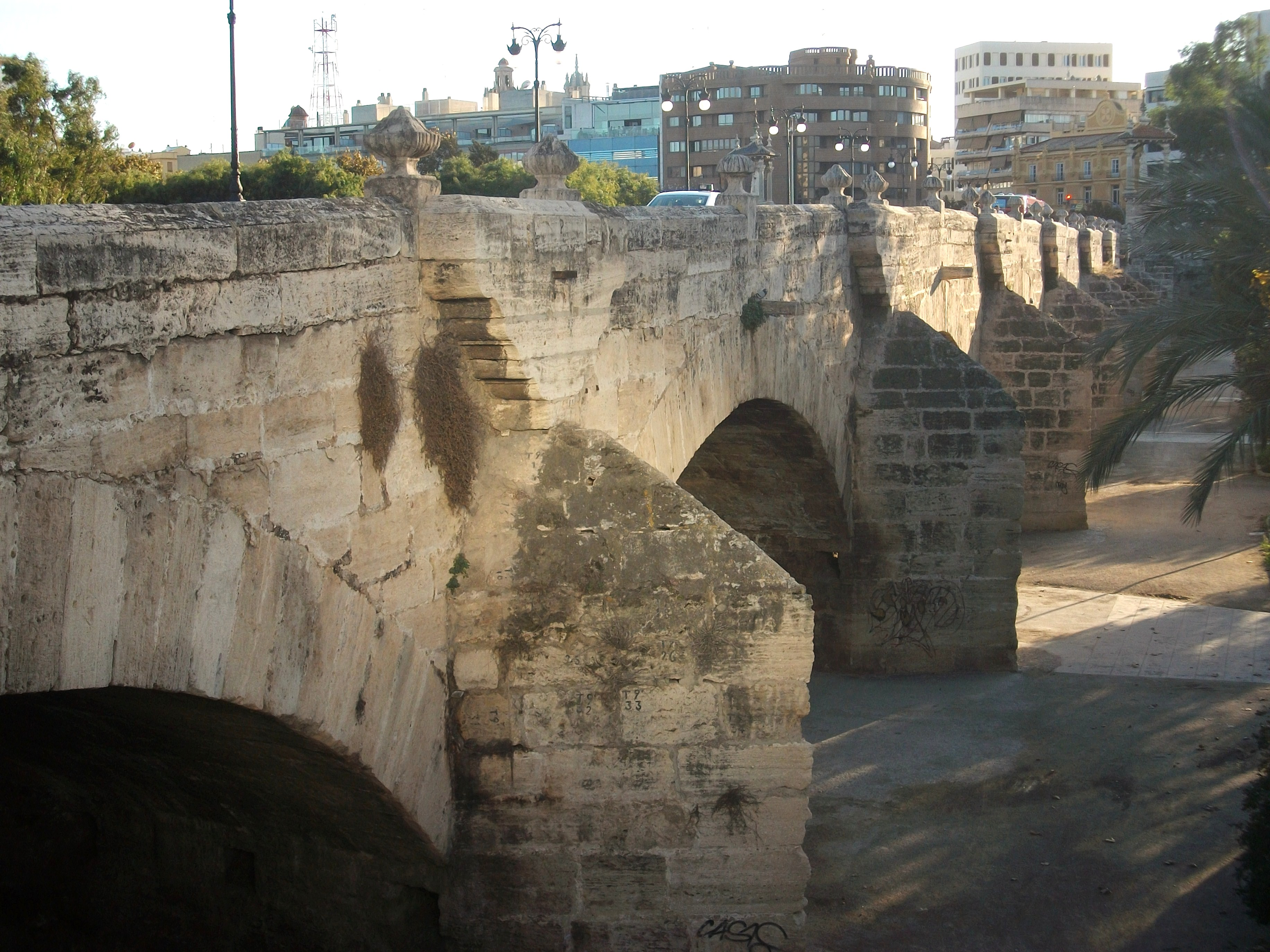 Pont del Real de València.